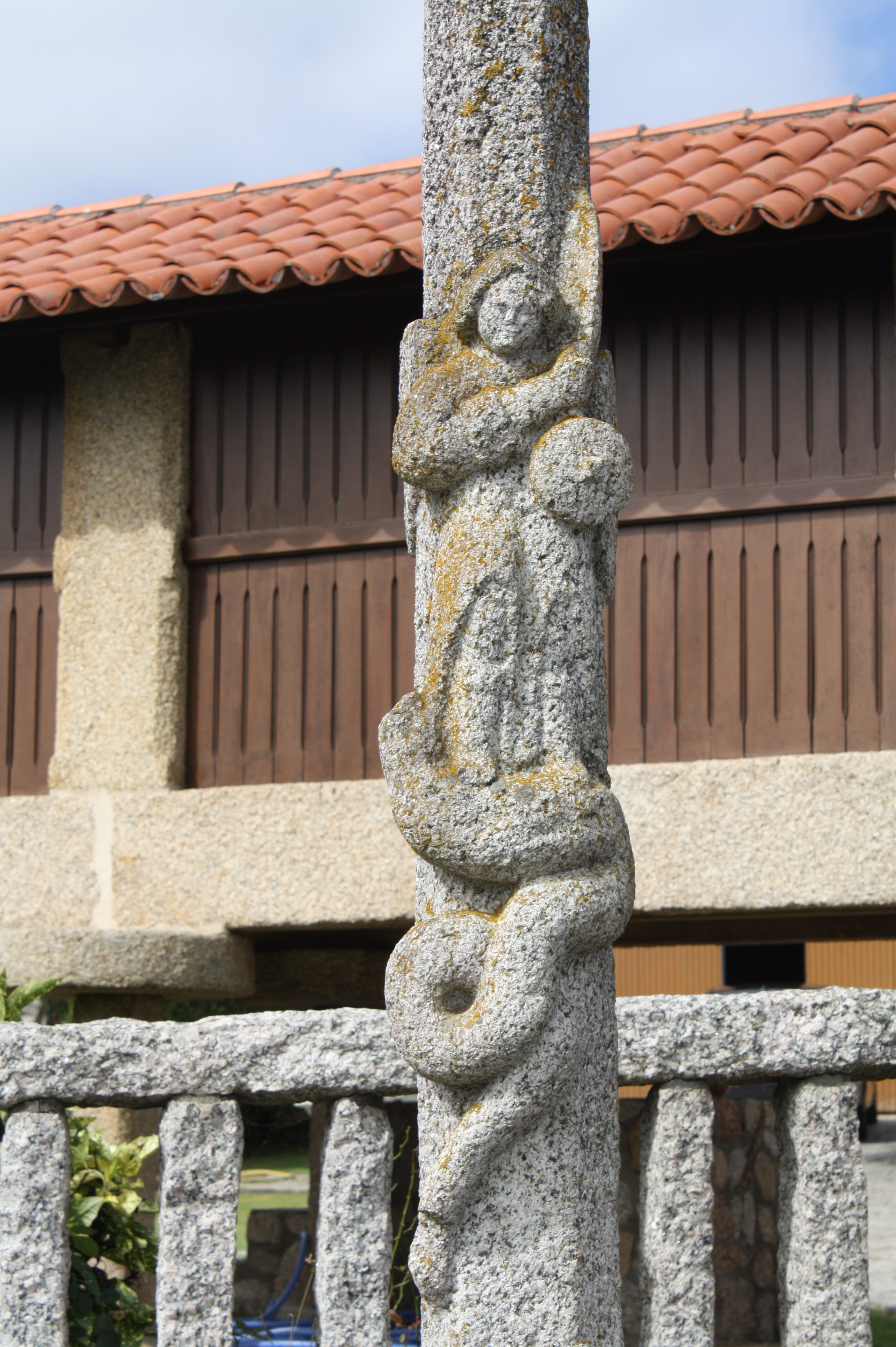 Detalle do cruceiro de San Miguel, no lugar do Casal, parroquia de Barrantes, concello de Ribadumia (Pontevedra)